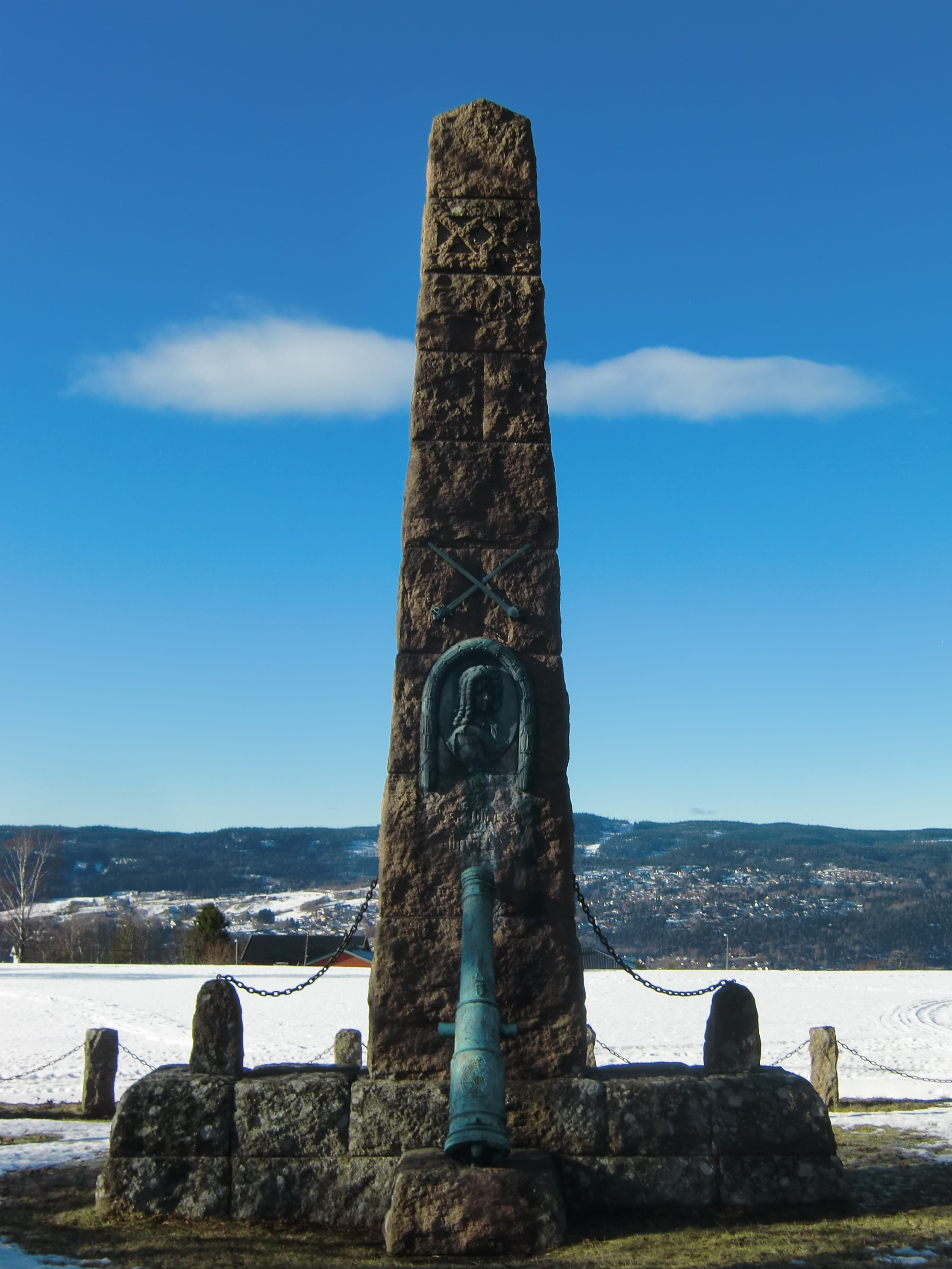 Monument over Iver Huitfeldt (1910) ved Hurum kirke